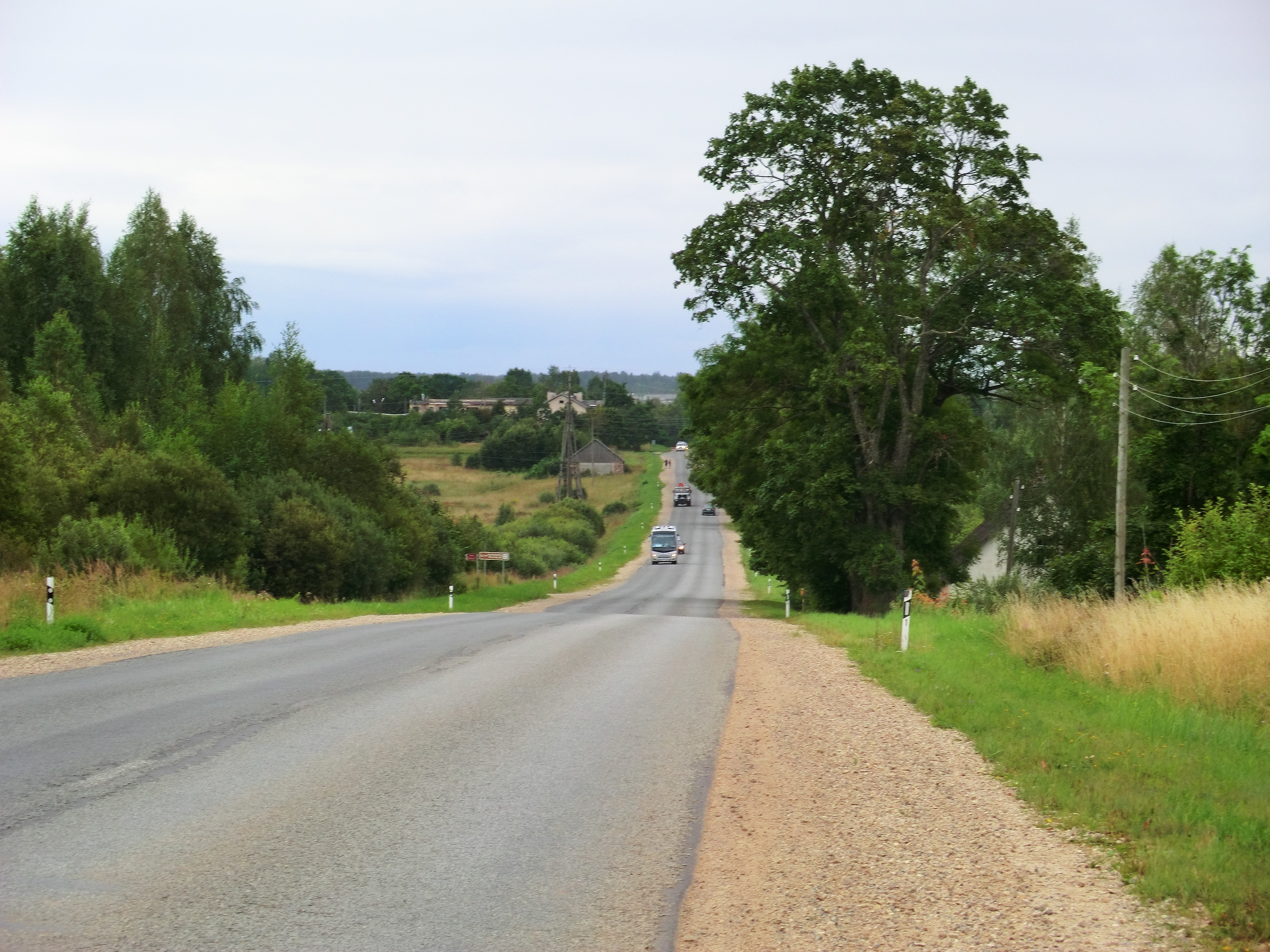 Beļavas pagasts, Latvia